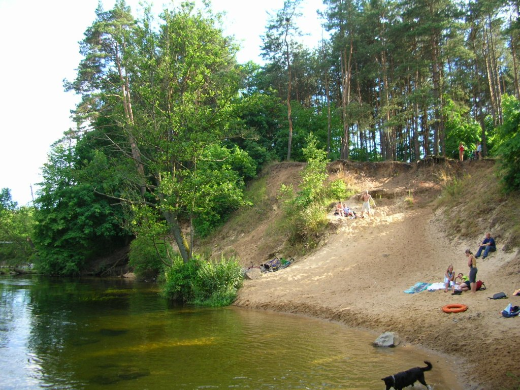 Brda w Bydgoszczy - Opławiec